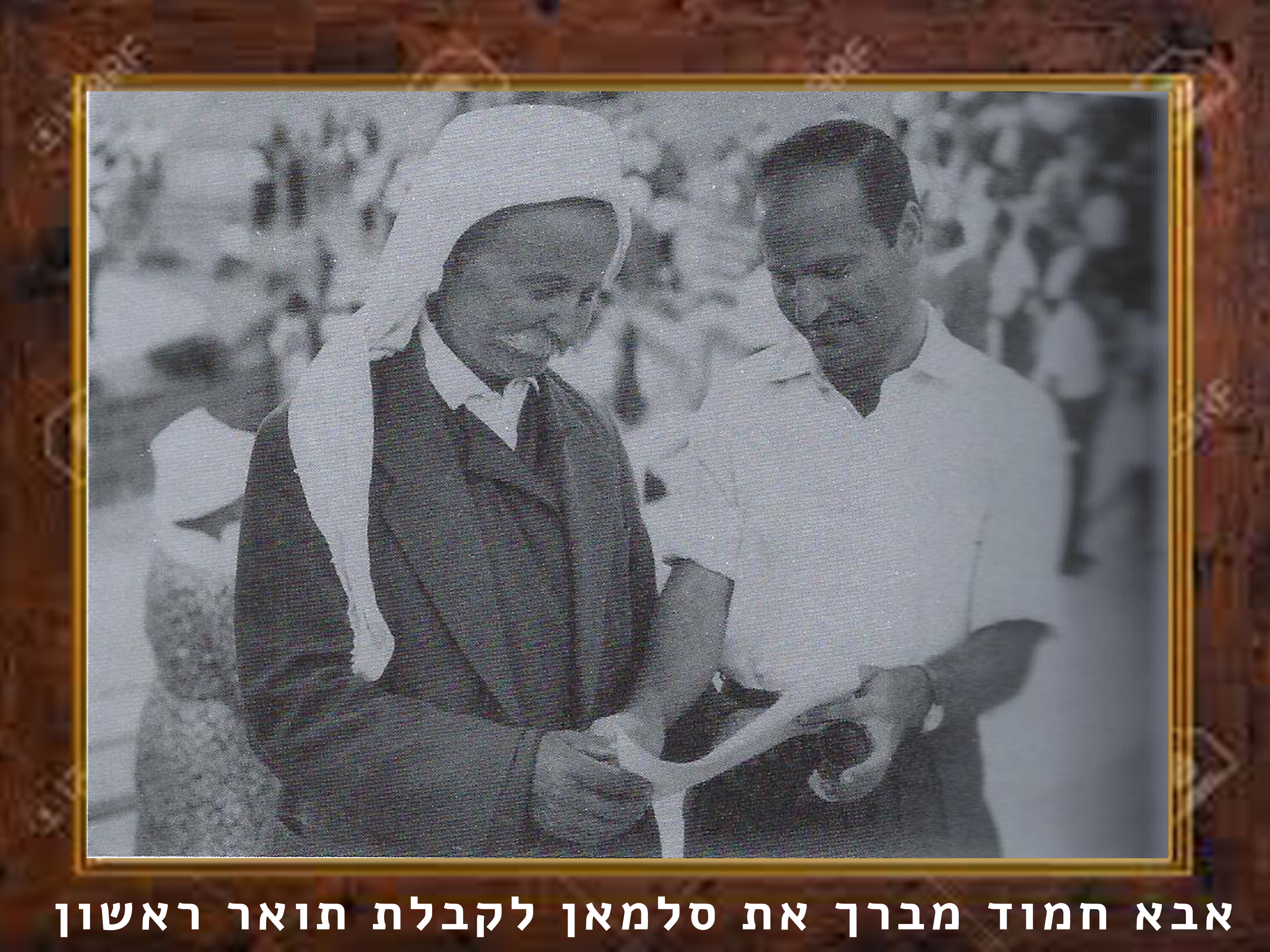 חמוד, אביו של סלמאן מברכו לקבלת התואר הראשון